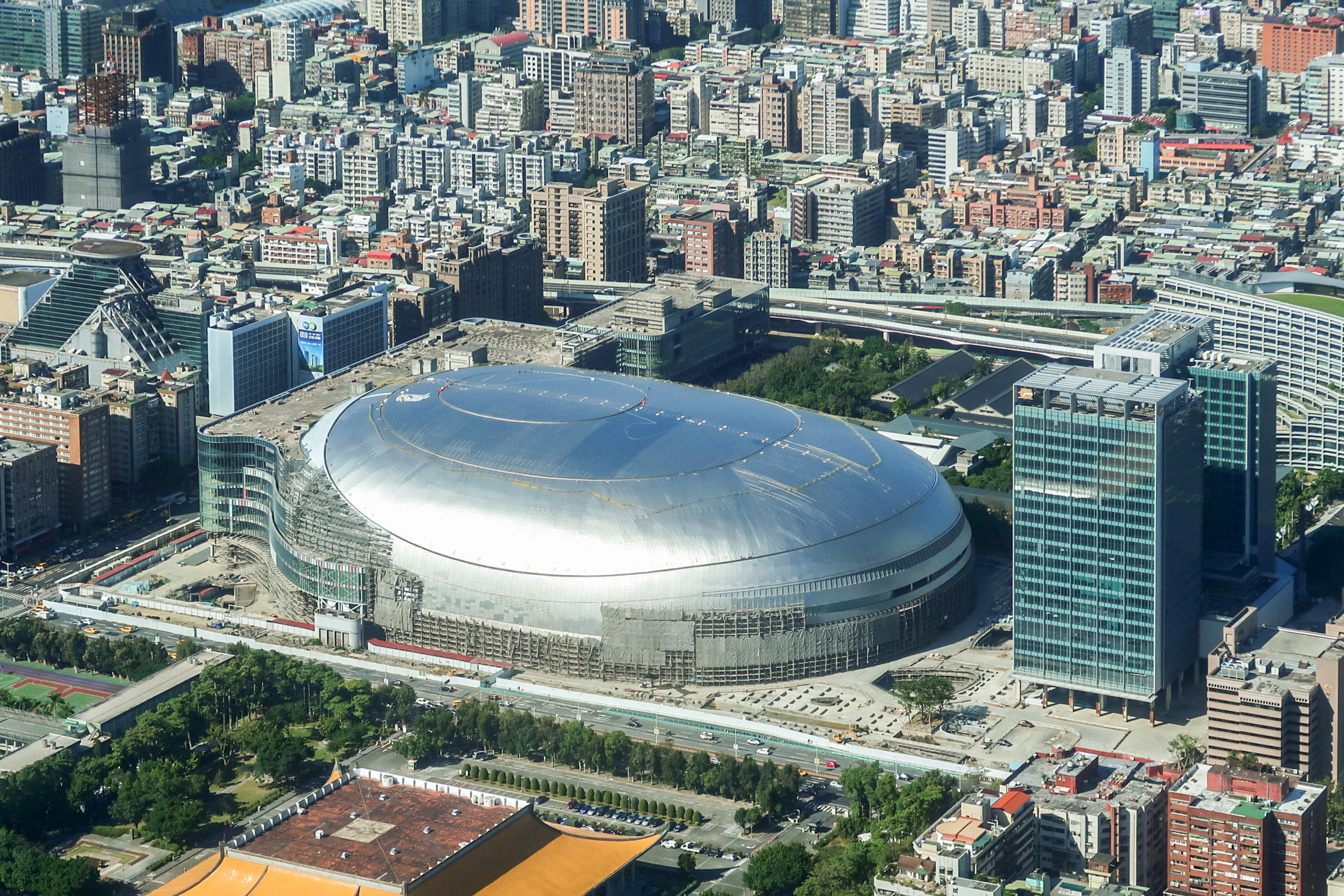 Taipei Dome site